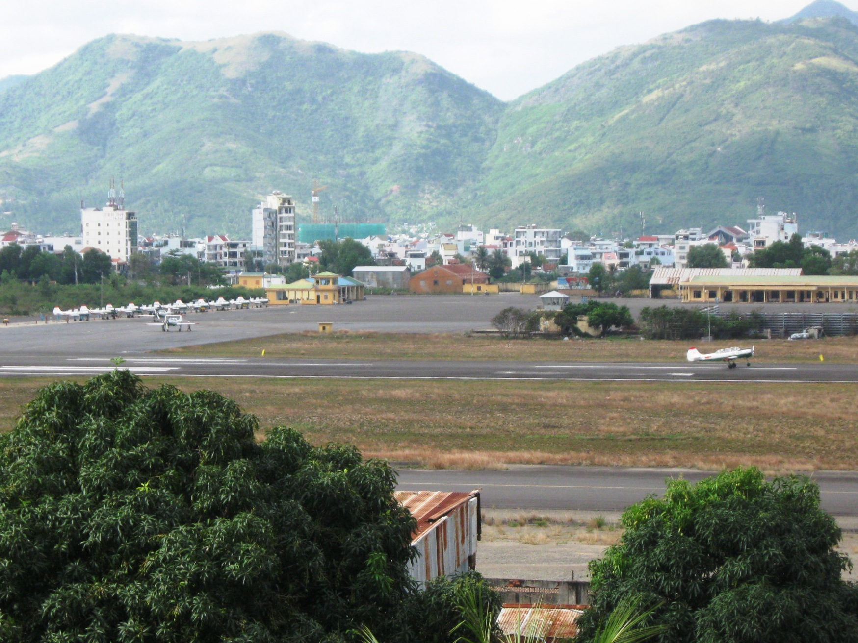 Учебные самолеты на ВПП